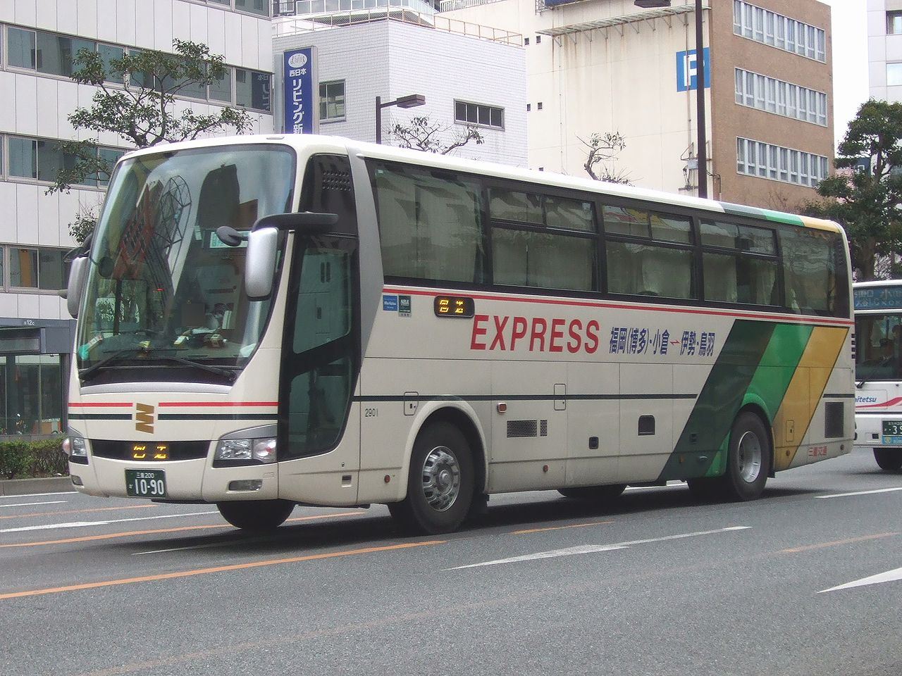 Express bus operated by Mie kotsu (Sanco), “Oisesan Express Fukuoka”. 三重交通・西鉄高速バスが運行する夜行高速バス「お伊勢さんEXPRESS福岡号」の三重交通便